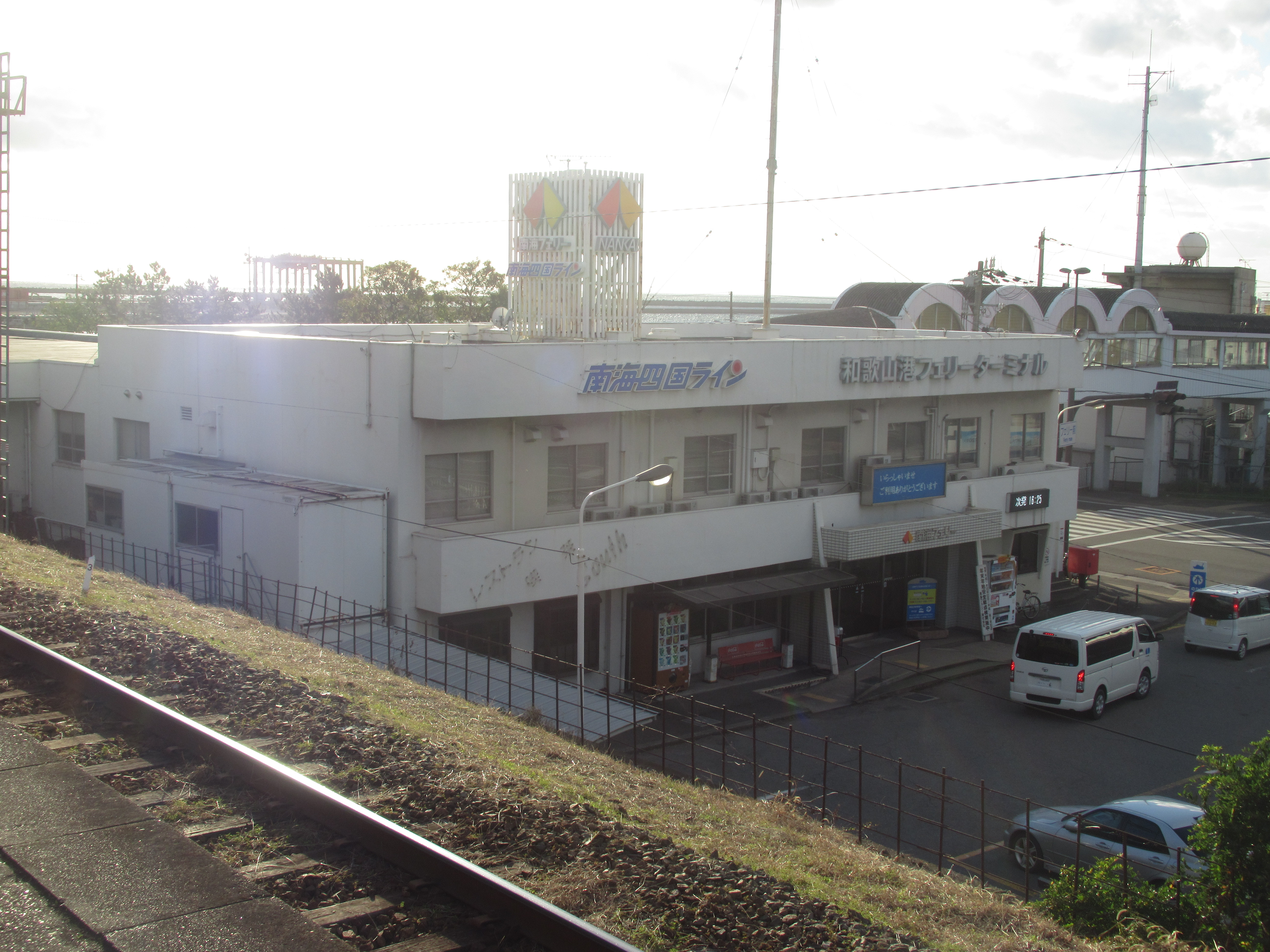 南海フェリー和歌山港